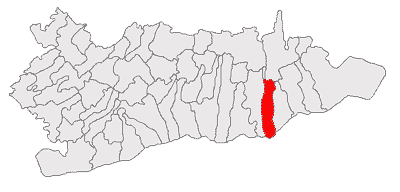 Categorie:Hărţi ale judeţului Călăraşi